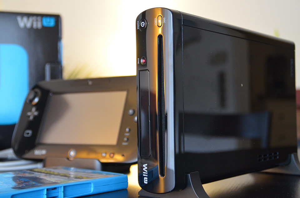 Das Nintendo Wii U Premium Pack mit Konsole, GamePad und Spiele.